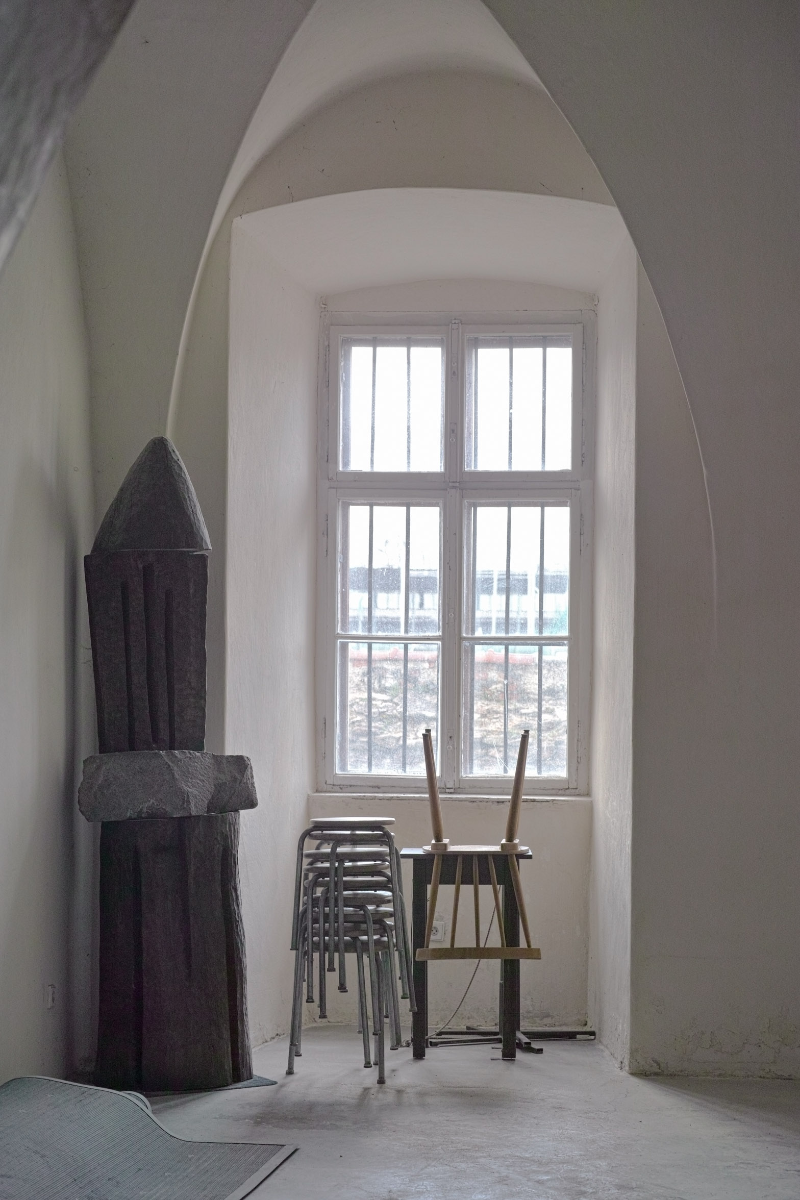 bývalá kaple svatého Jiří, České Budějovice